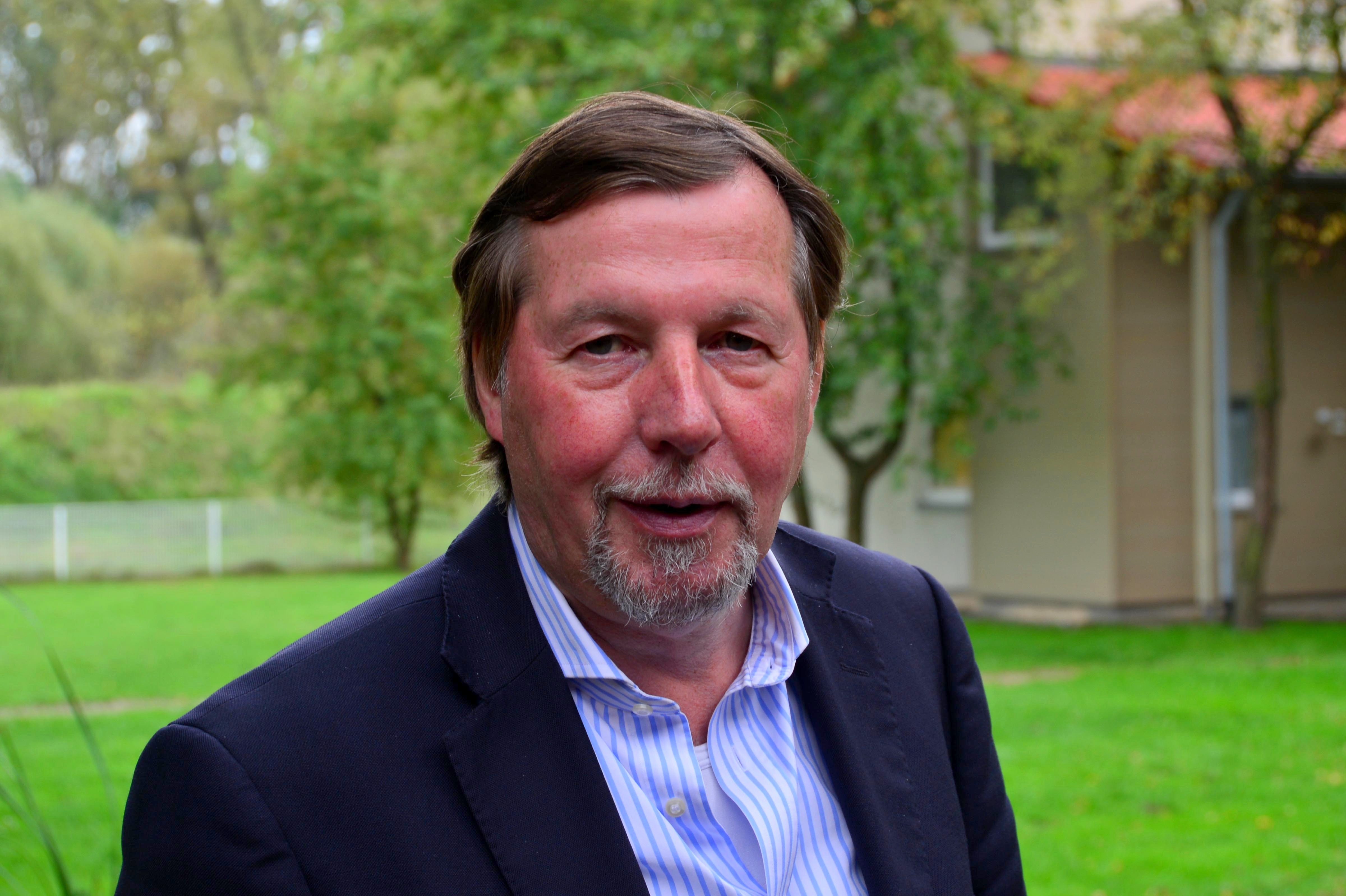 Christoph Heubner, Berlin Geschäftsführender Vize-Präsident Internationales Auschwitz Komitee (IAK) in Berlin